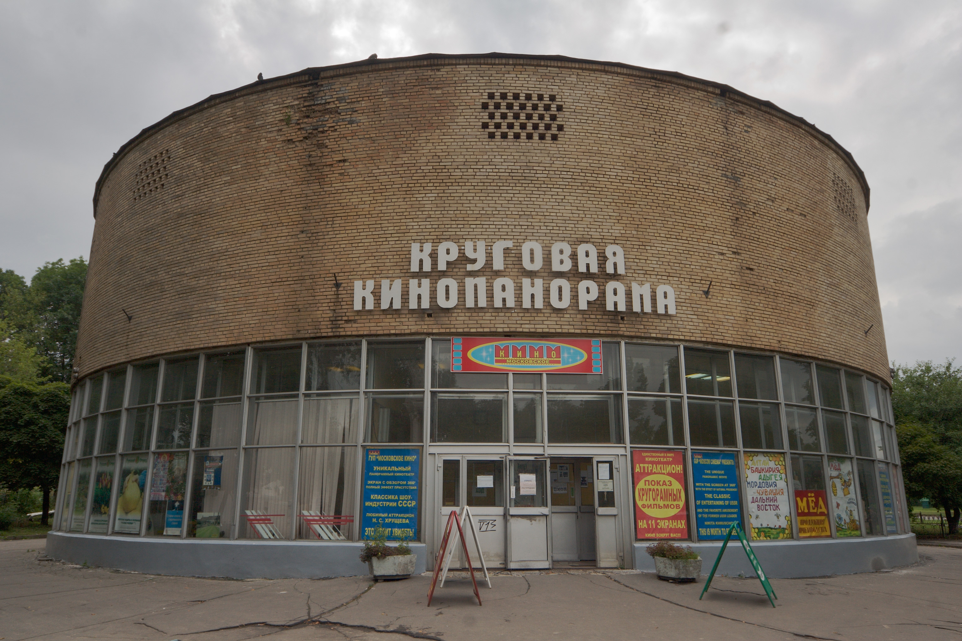 Кинотеатр Круговая Кинопанорама на территории ВВЦ, Москва